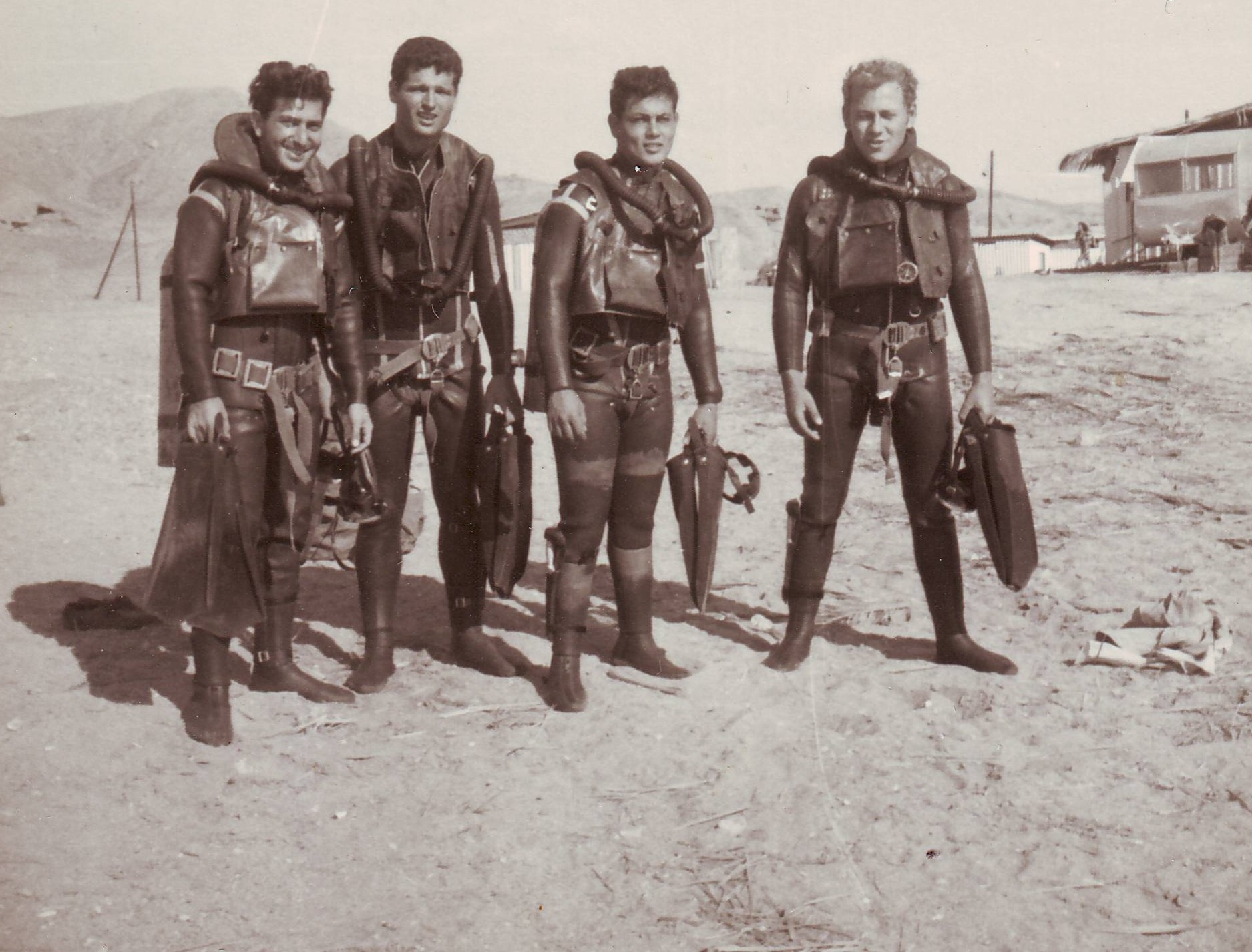 לוחמי יחידה 707 ערוכים לקראת פעולה בחוף סיני